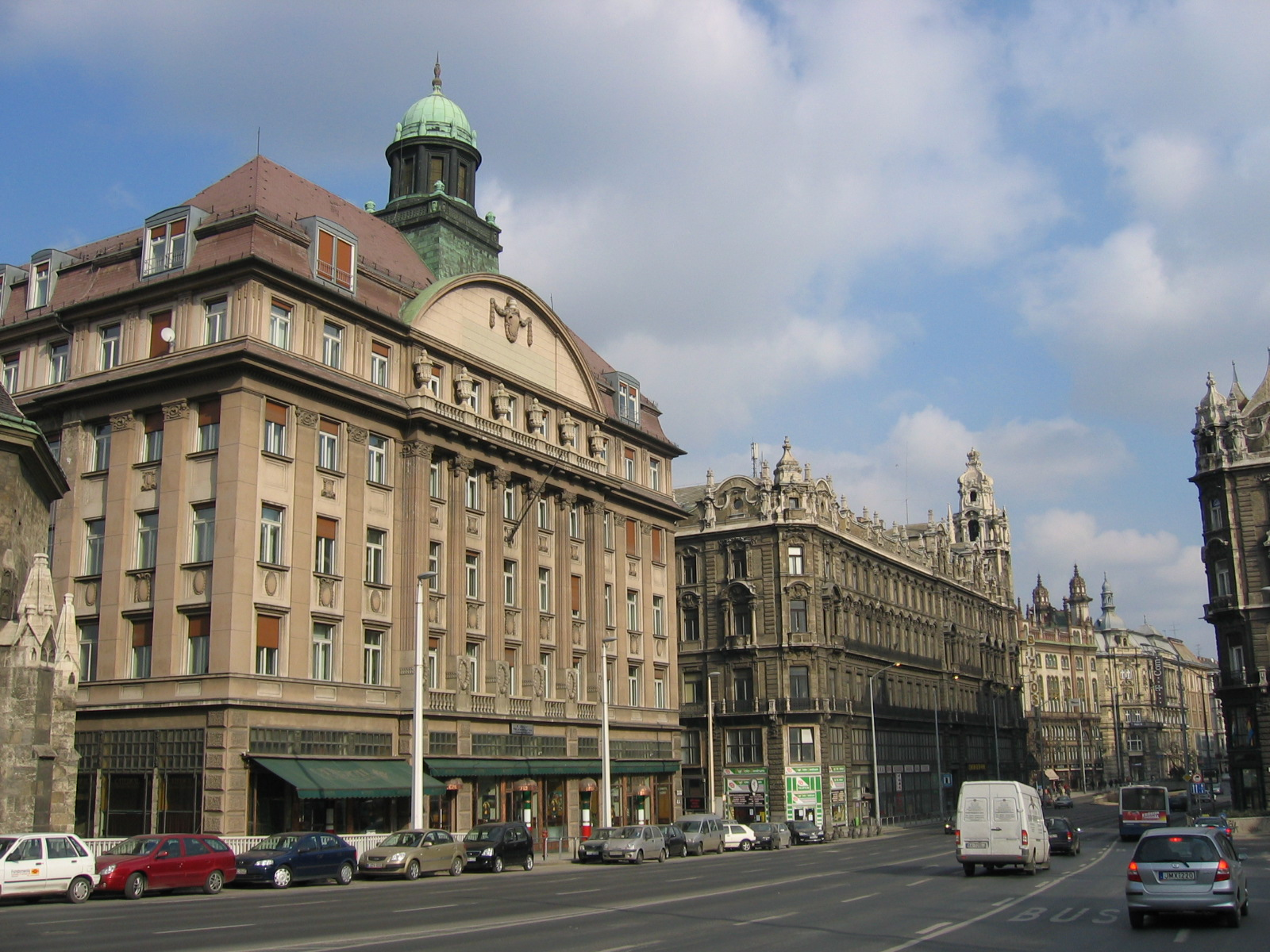 Budapest, Hungary, Buildings, Szabad sajtó út, January 2006.jpg